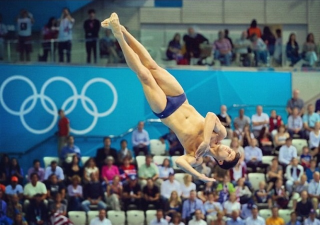 Edickson Contreras durante participación Juegos Olímpicos Londres2012